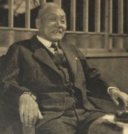 川村喜十郎（川村インキ製造所創設者）